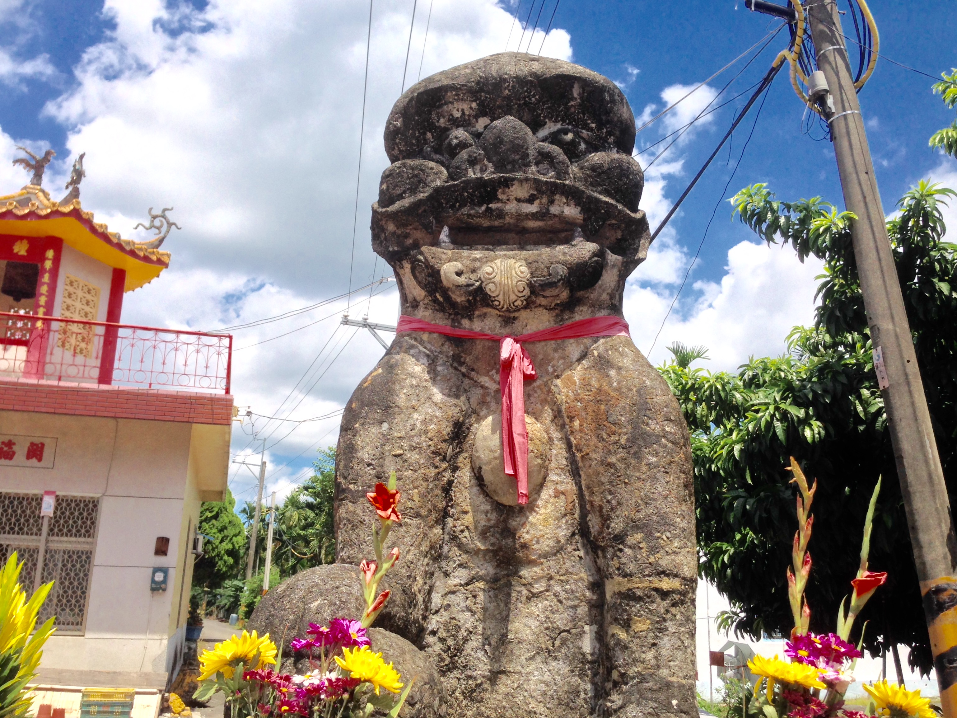 中文（台灣）: 獅老大正面